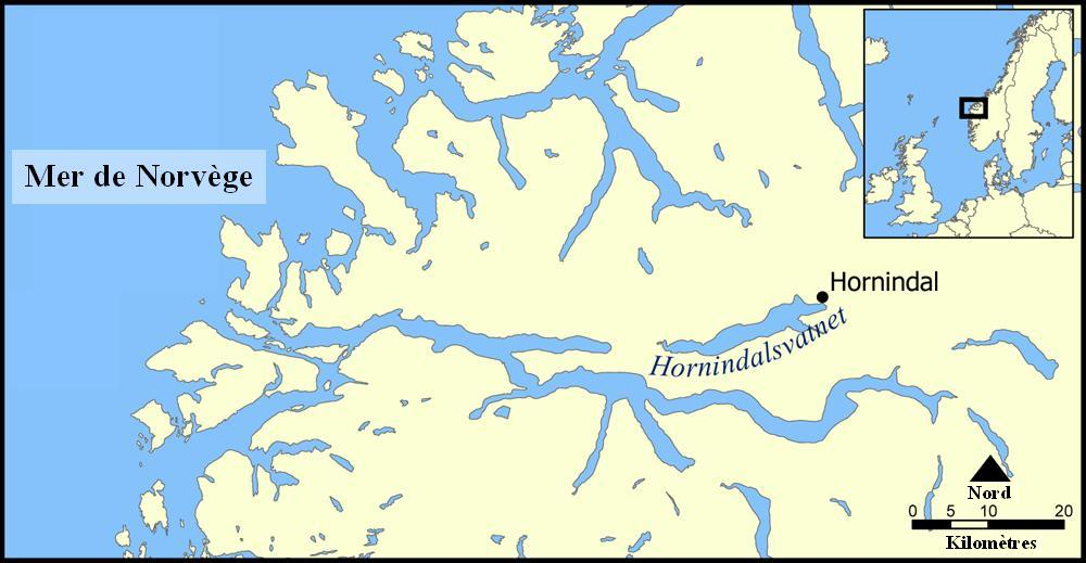 *Le lac Hornindalsvatnet en Norvège. Image issue de Wikicommons (sous licence GFDL) et traduite en français pour wikipedia francophone